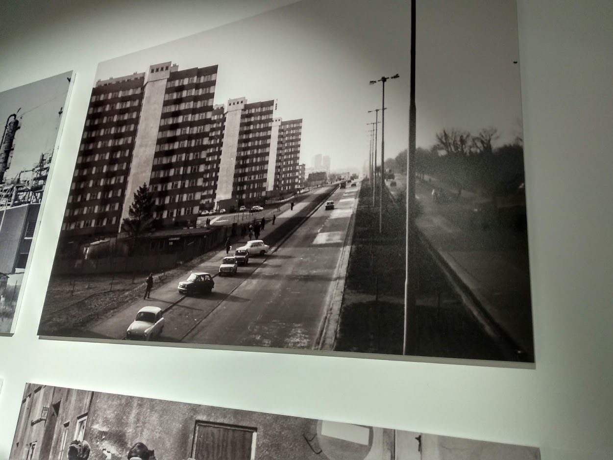 Muzeum Historii Włocławka (2019 r.)